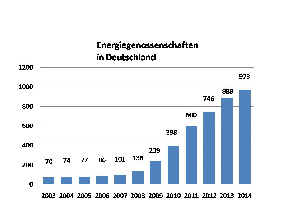 Energiegenossenschaften in Deutschland